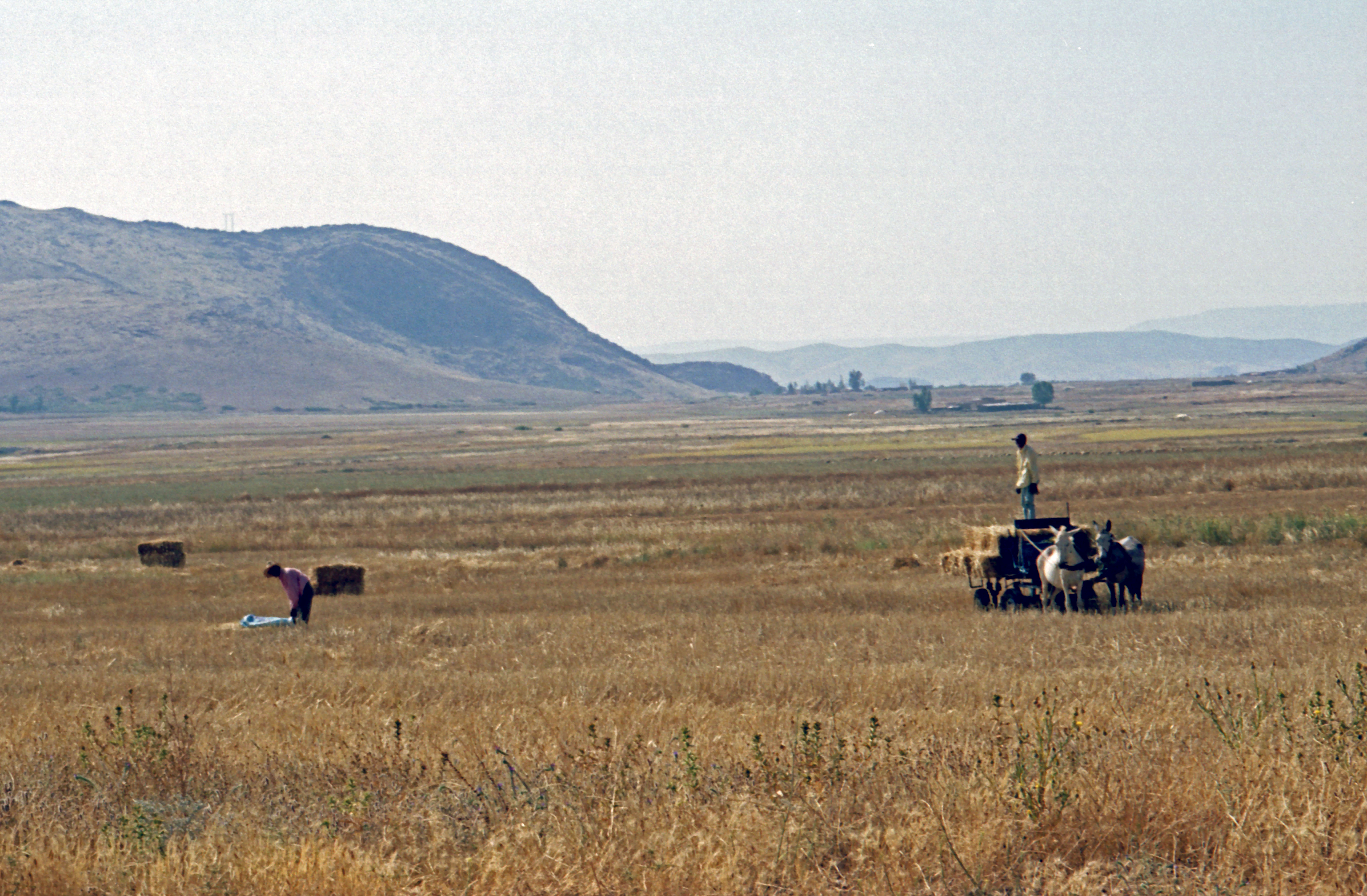 Morocco-103